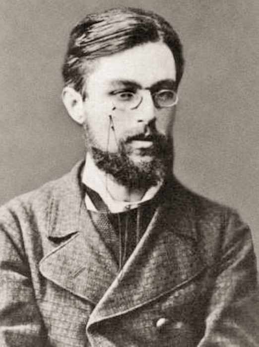 Valerian Andreevič Osinskij